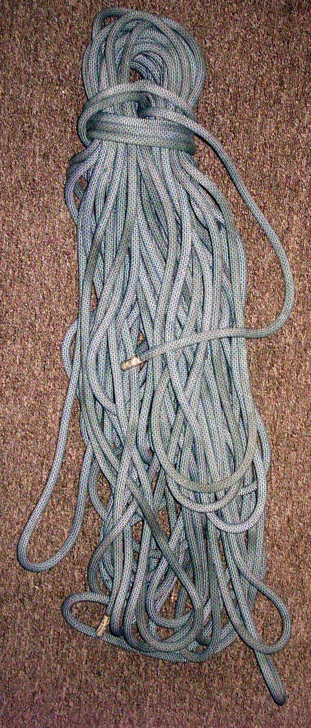 Gelegtes Bergseil (Einfachseil, 50 Meter)